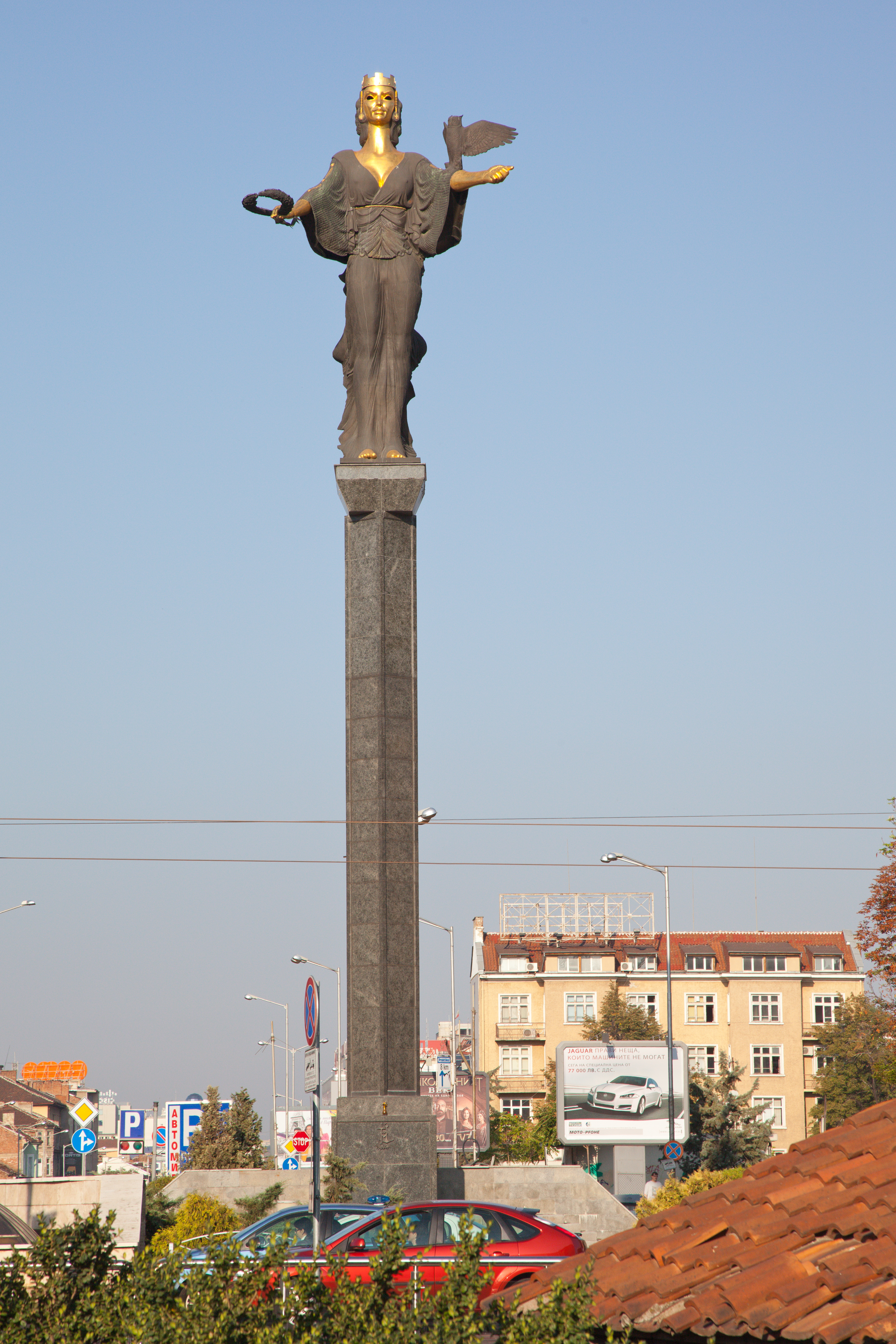 Statue der Heiligen Sofia (Sofia ist jedoch nach der Kirche Heilige Sofia benannt, nicht nach der Heiligen Sofia direkt), Sofia